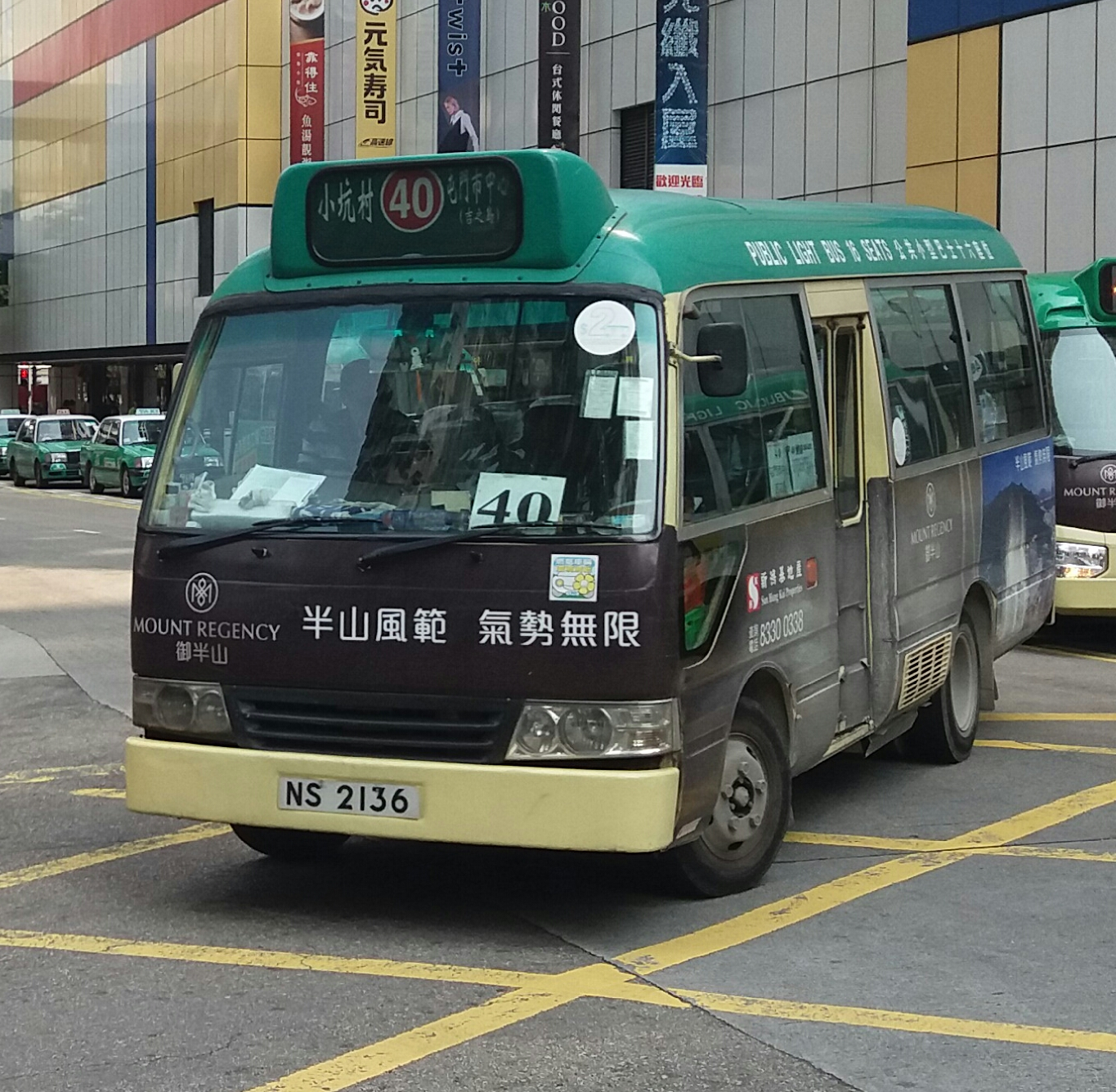 中文（香港）: 剛駛離屯門市中心總站的新界區專線小巴40線